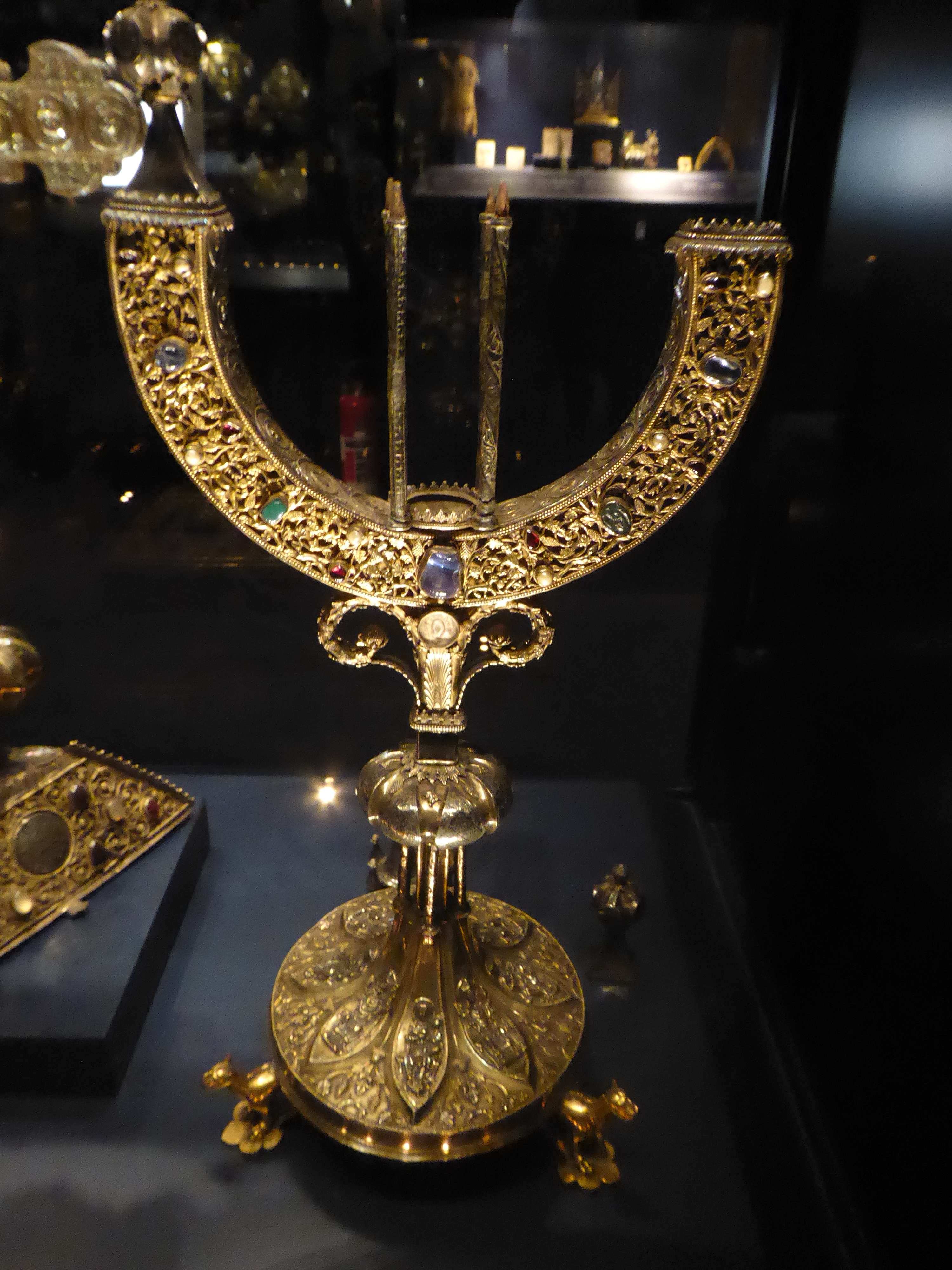 Reliquaire réalisé en 1238 par Hugo D'Oignies. Parcellement démonté pour une analyse ADN de la relique. Classé parmi les "32 pièces du trésor d’Oignies, Hugo d'Oignies et atelier" comme trésor de la Communauté Française depuis le 26 janvier 2010.